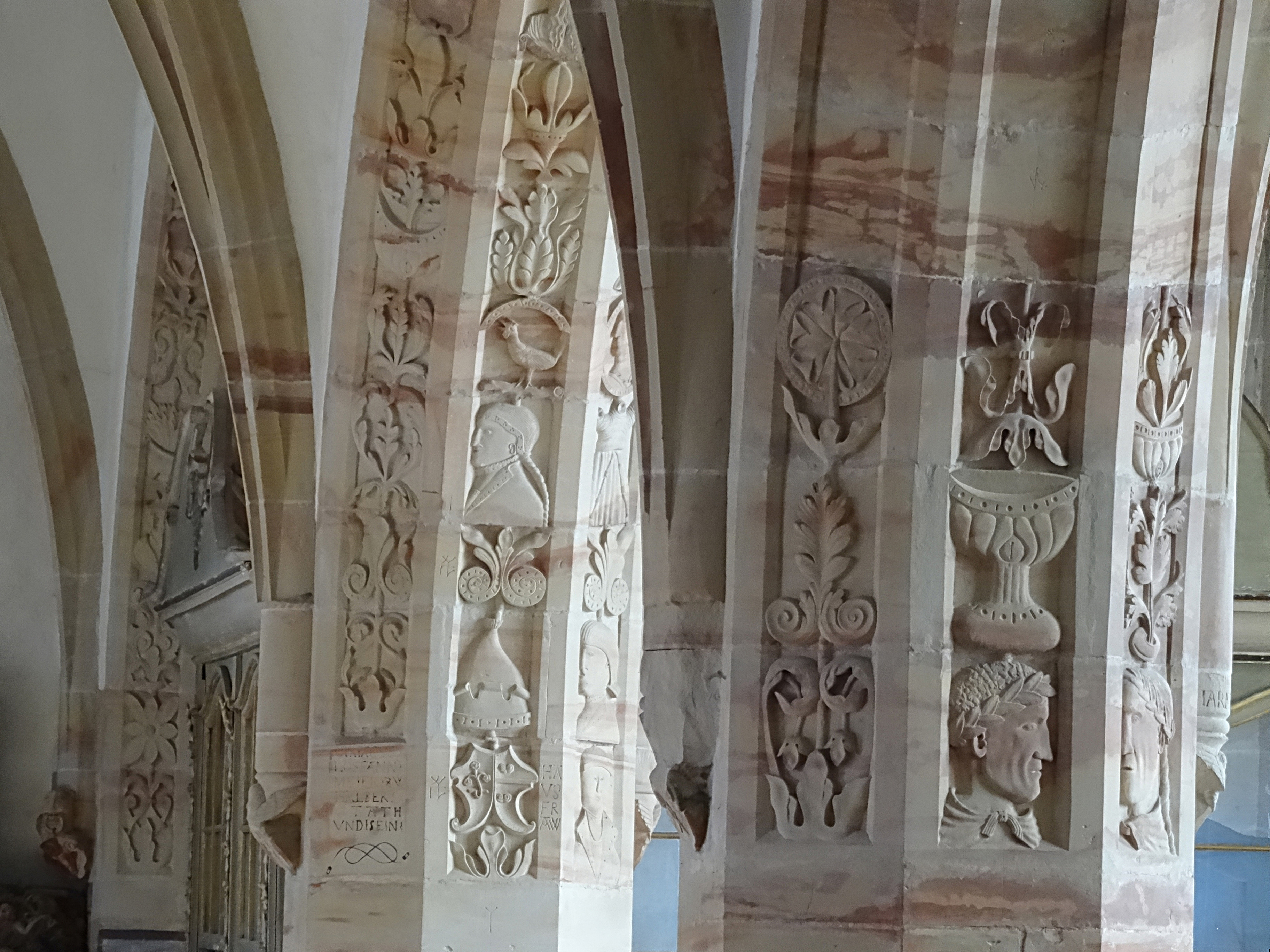 reichverzierte Arkadenbögen der Buntsandsteinpfeiler in St. Stephani (Osterwieck)